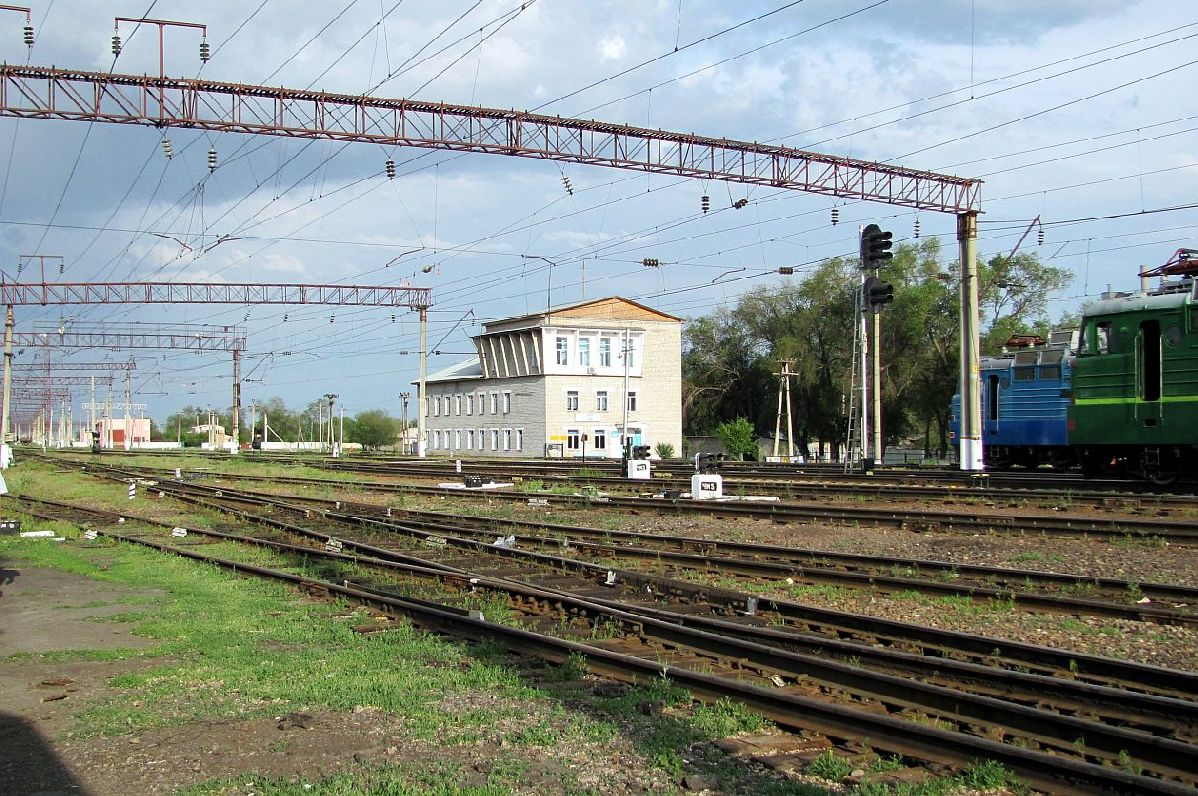 Железнодорожная станция Отар